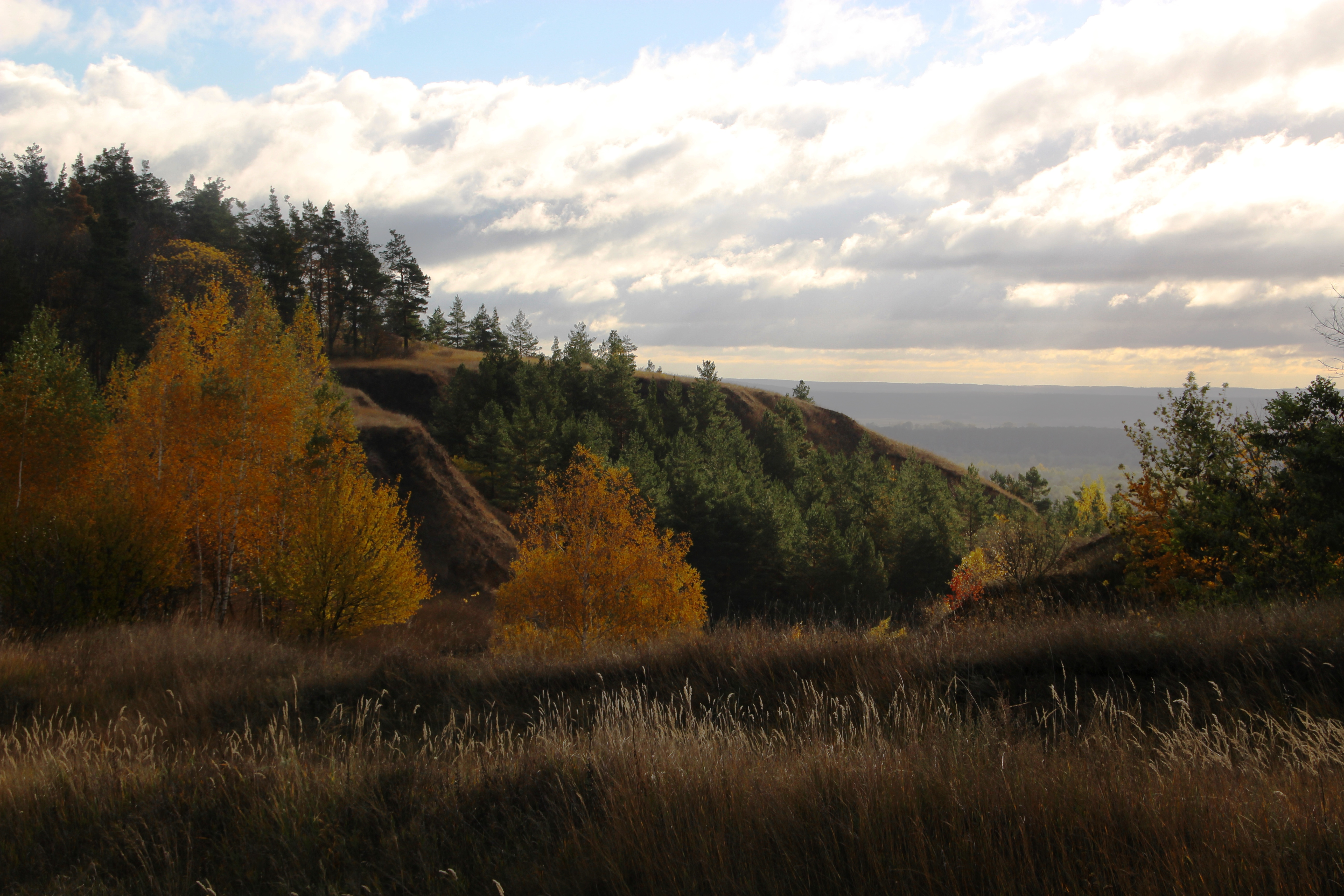 Неймовірної краси краєсиди відкриваються з виского правого берега Псла біля села Межиріч Лебединського району.